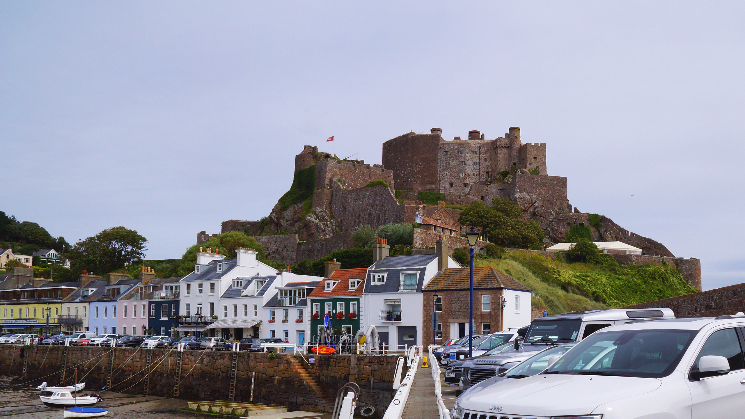 Gorey village with Harbour and Mont Orgueil Castle - Island of Jersey, british Channel Islands - Kanalinseln - Foto 2017 Wolfgang Pehlemann DSC05012